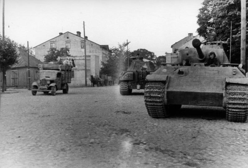 Information added by Wikimedia users.Siedlce, Piłsudskiego-Starowiejska straße, 24.-29. Juli 1944